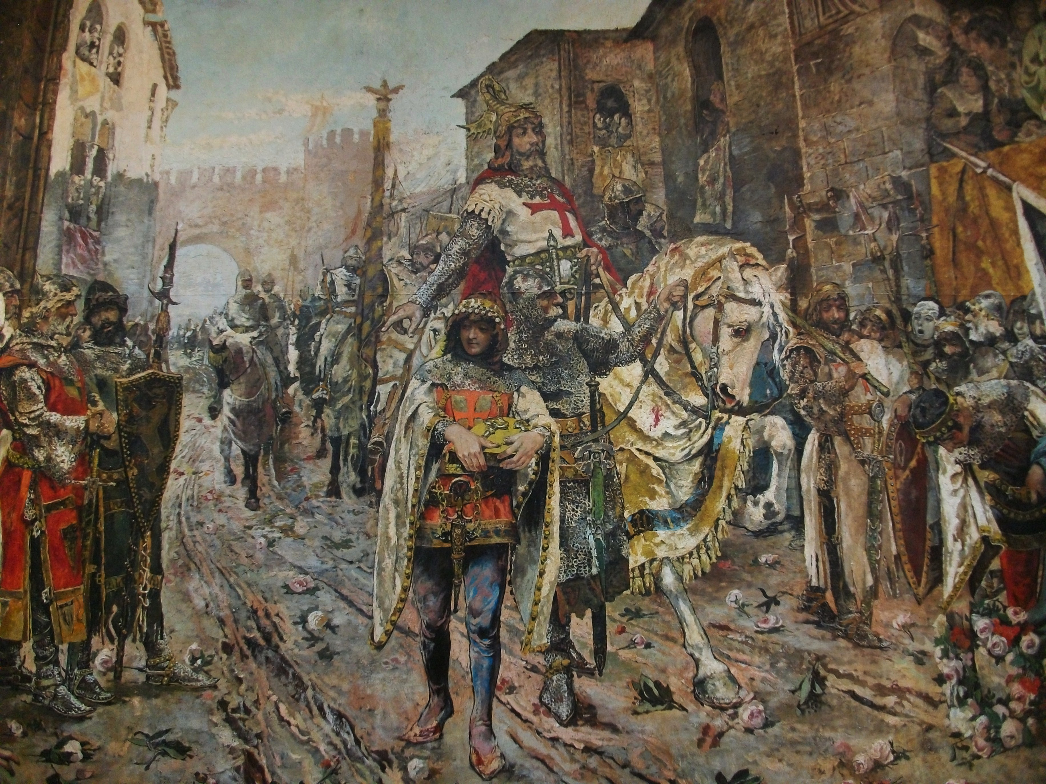 Detall del quadre Entrada triomfal del rei Jaume I a la ciutat de València (1884), Fernando Richart Montesinos (Castelló 1858), Museu de Belles Arts de Castelló. Oli sobre llenç 390 x 665 cm. Dipòsit del museu del Prado.